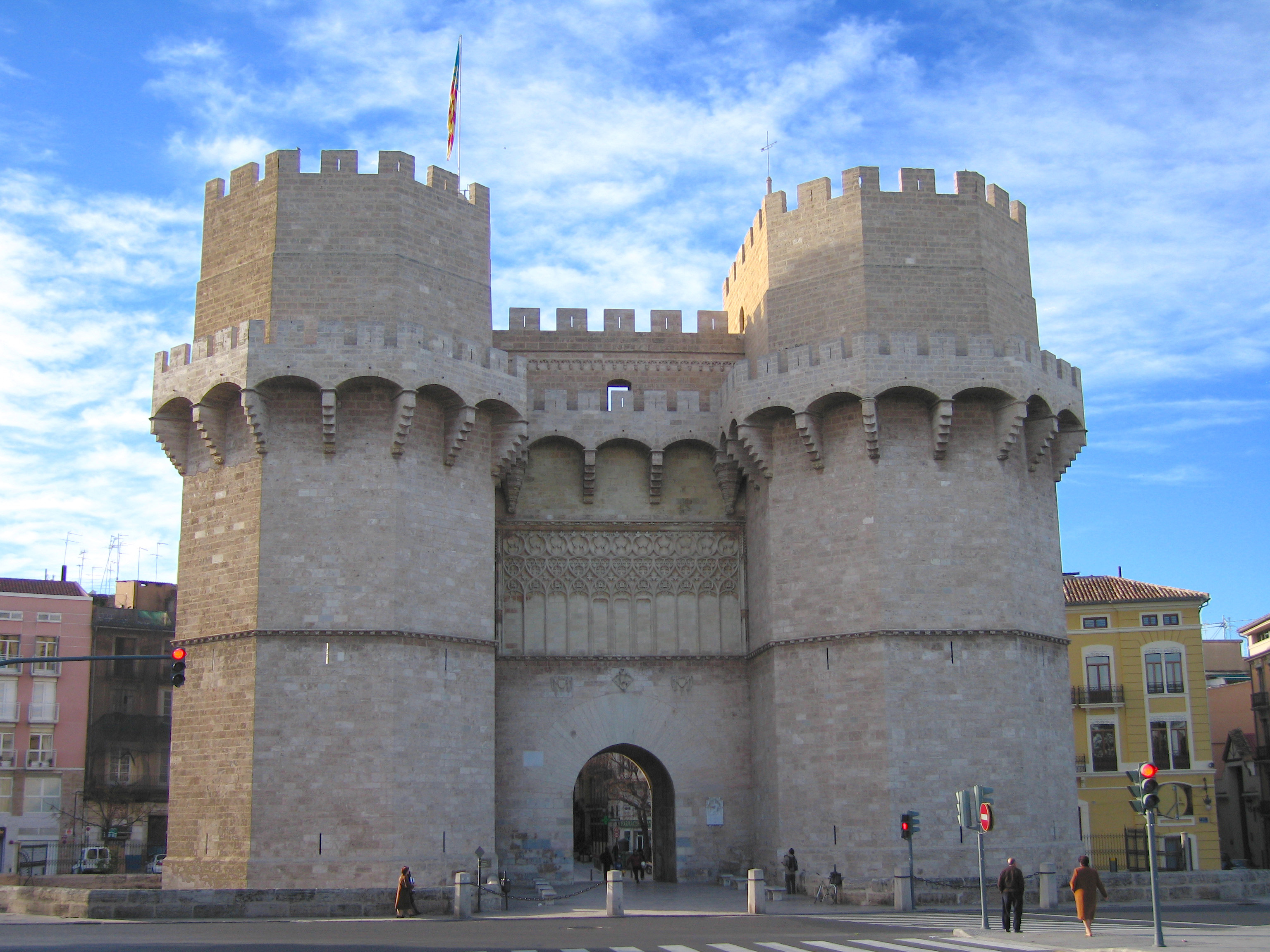 Torres de Serrans (València)